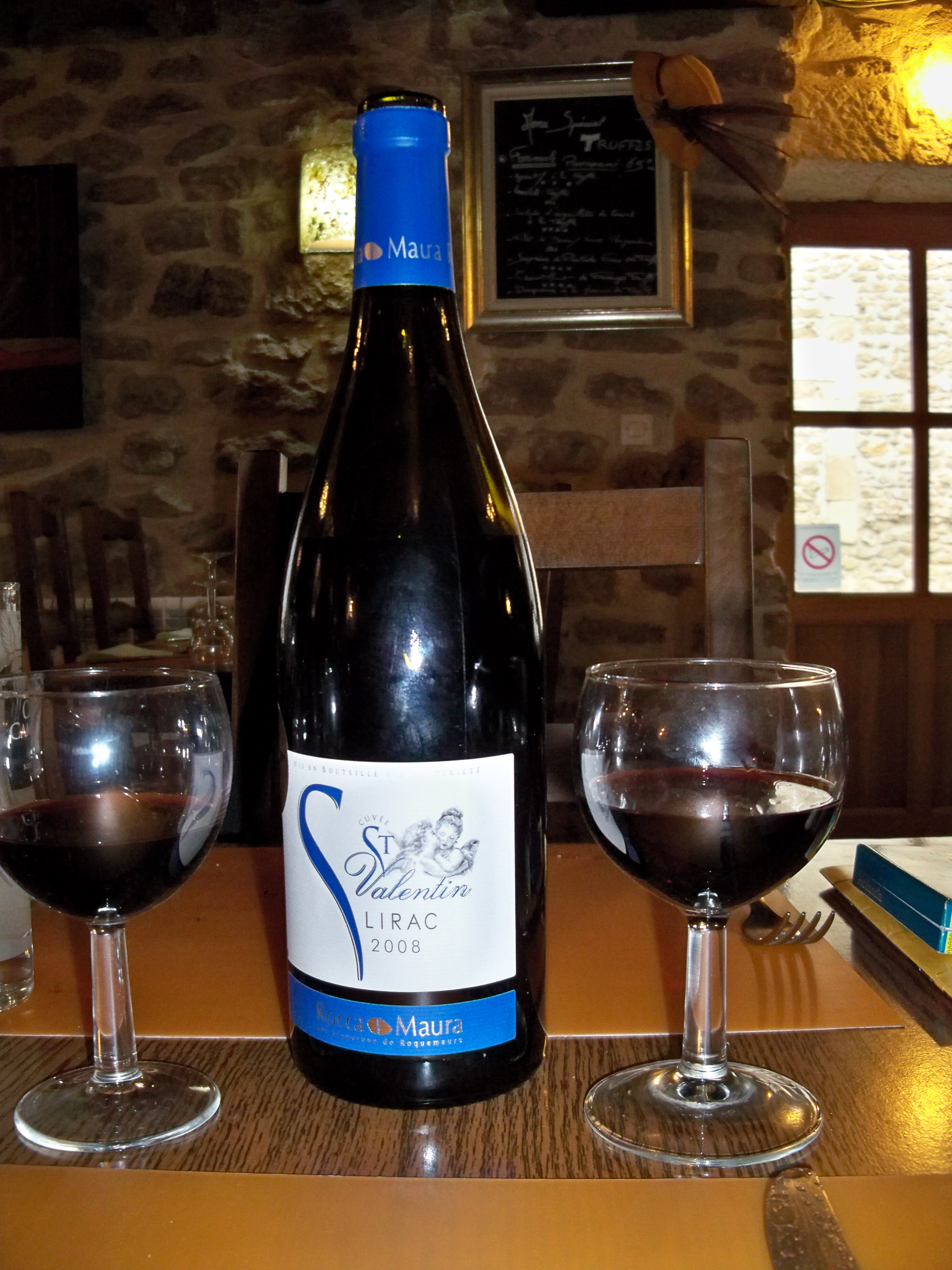 Bouteillle de Lirac AOC rouge